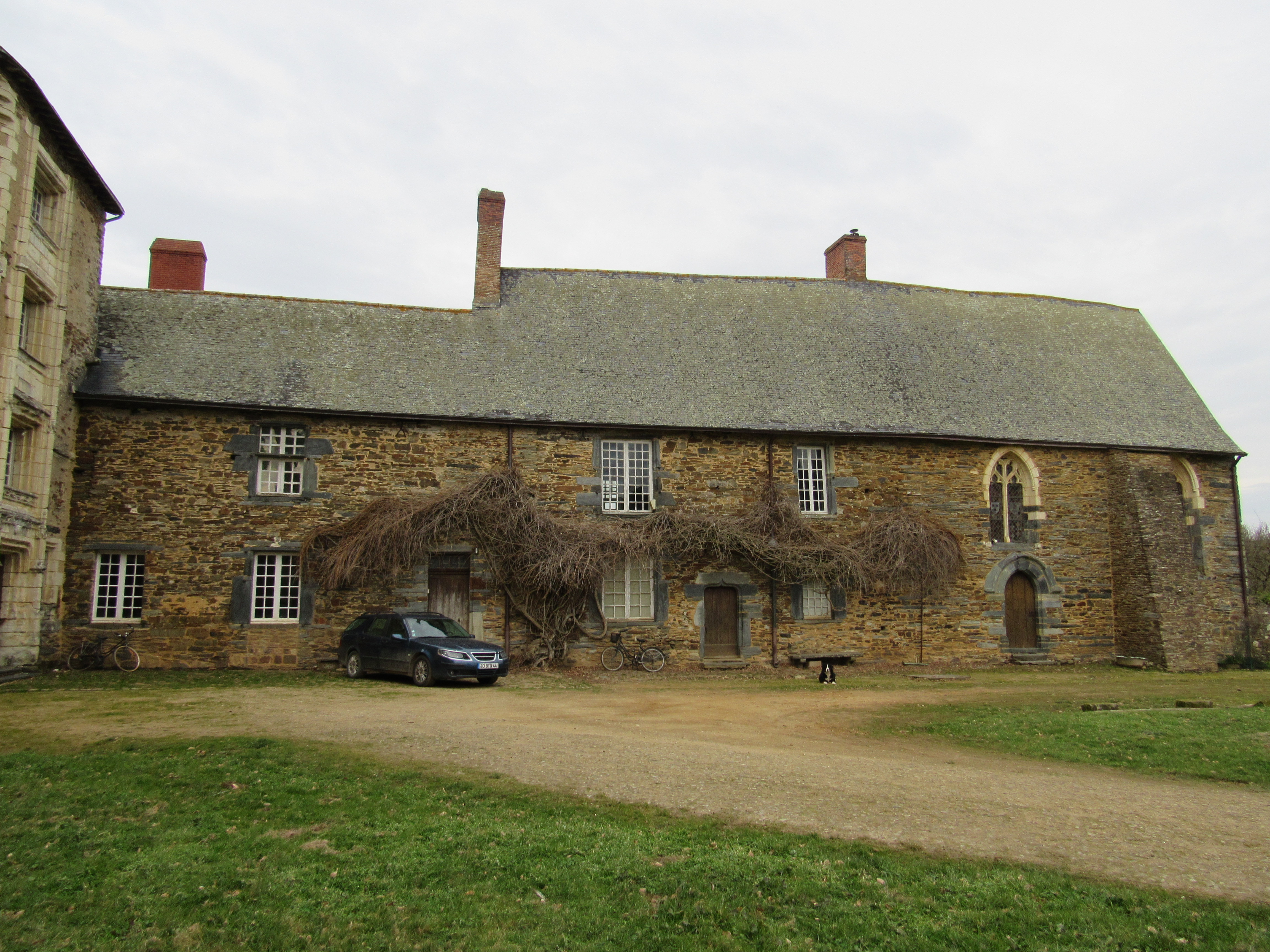 Façade du vieux logis des Penhoët au château de la Motte-Glain.